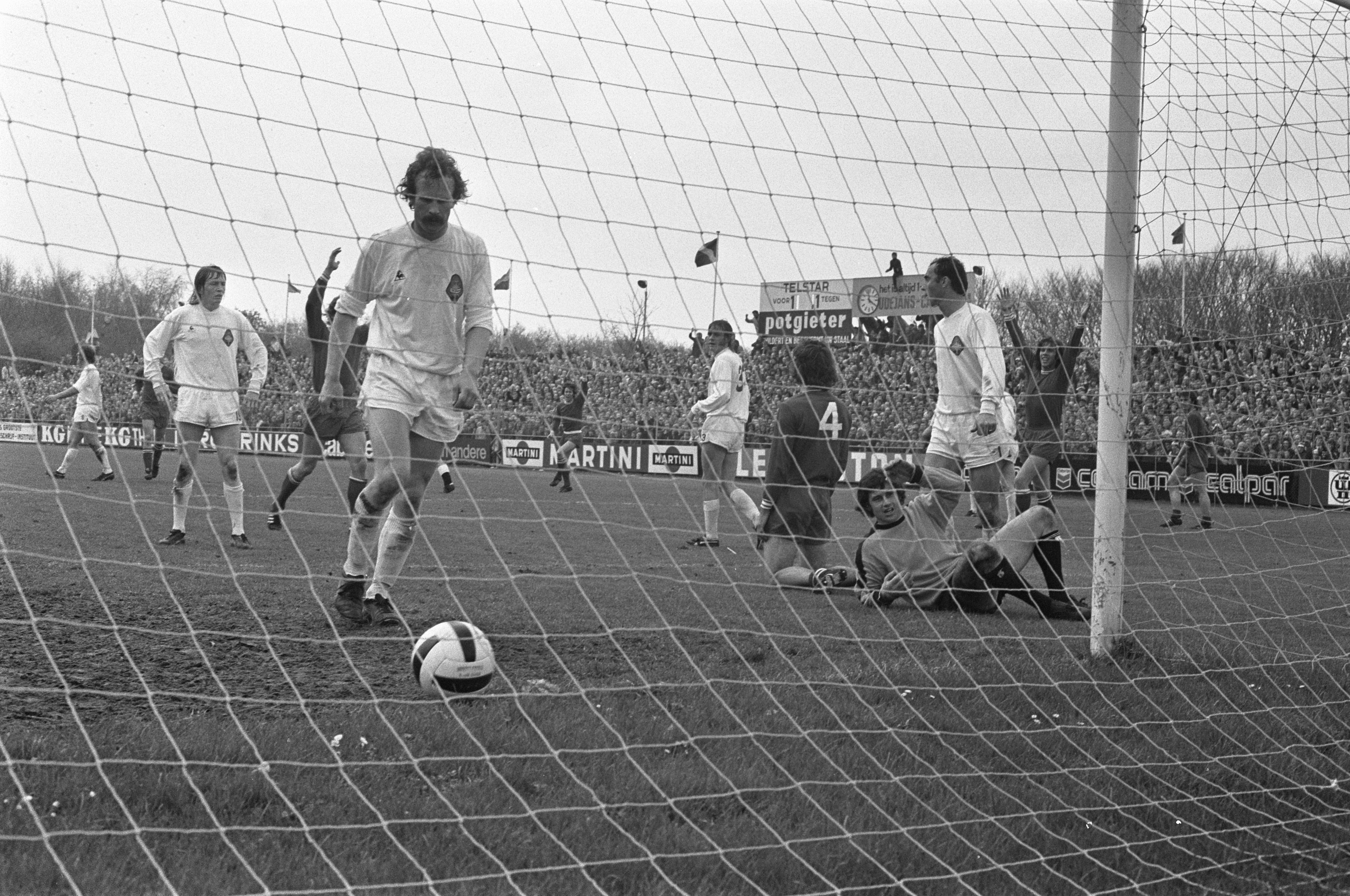 Collectie / Archief : Fotocollectie Anefo Reportage / Serie : Voetbalwedstrijd Telstar tegen Ajax, eindstand 1-2 Beschrijving : Het maken van het winnende doelpunt voor Ajax Annotatie : In het midden, teruglopend naar het doel Fred Bischot Datum : 30 april 1972 Locatie : IJmuiden, Noord-Holland Trefwoorden : doelpunten, sport, voetbal Fotograaf : Fotograaf Onbekend / Anefo Auteursrechthebbende : Nationaal Archief Materiaalsoort : Negatief (zwart/wit) Nummer archiefinventaris : bekijk toegang 2.24.01.05 Bestanddeelnummer : 925-5678